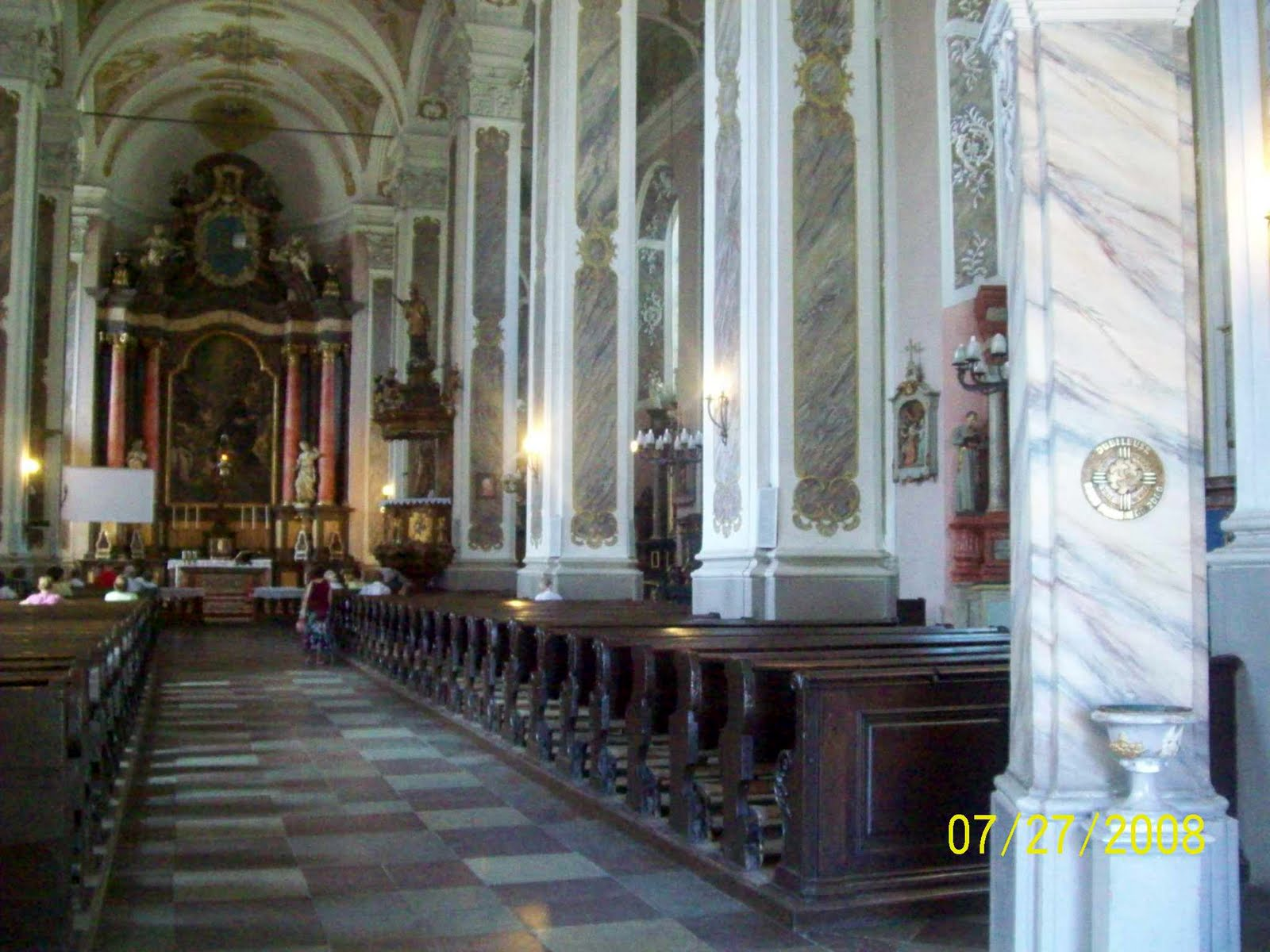 Gdańsk Stare Szkoty. Kościół św. Ignacego Loyoli.